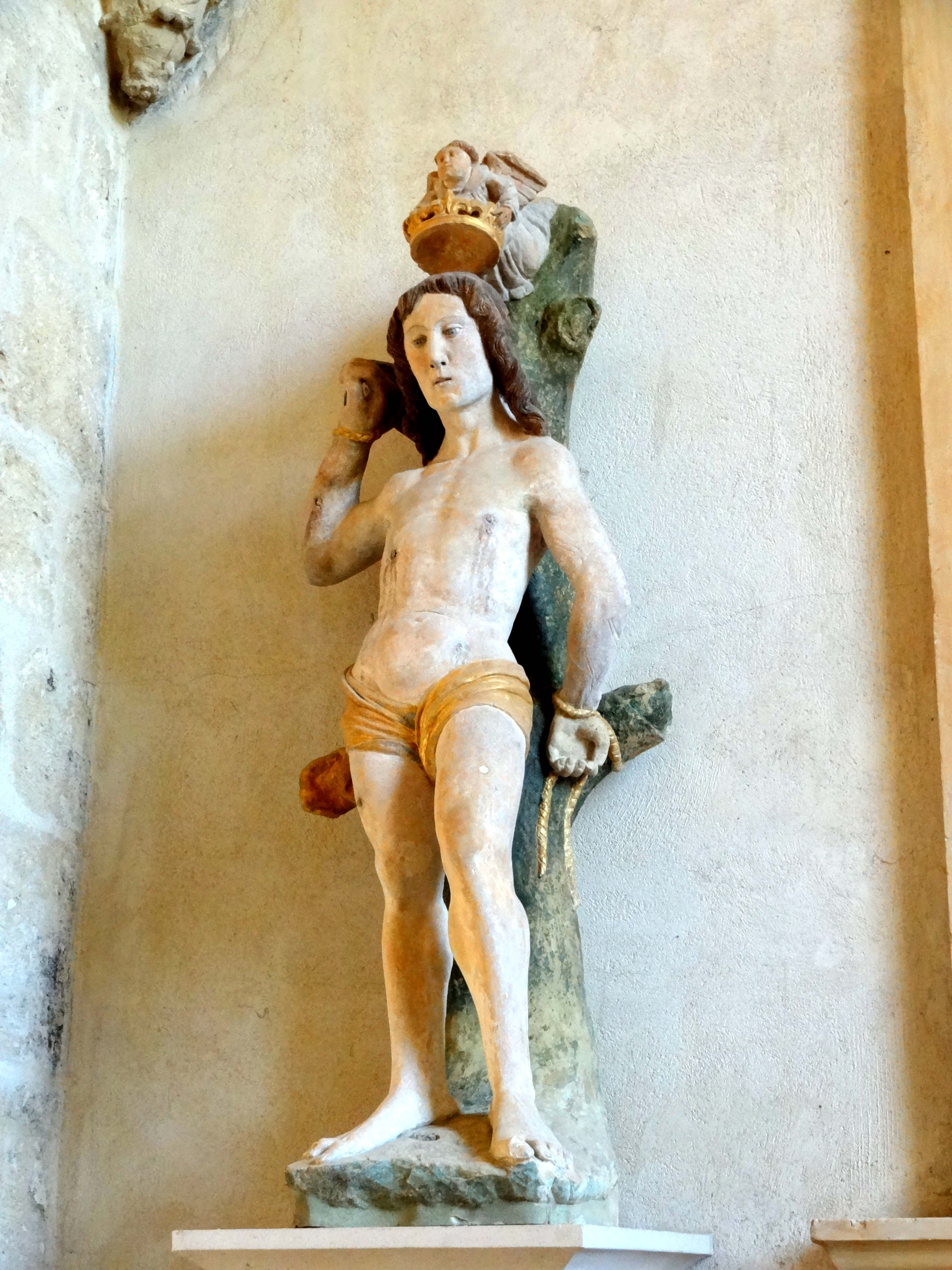 Statue de saint Sébastien.